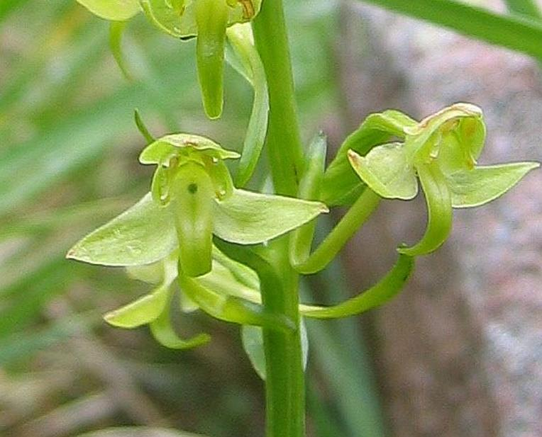 Platanthera_algeriensis